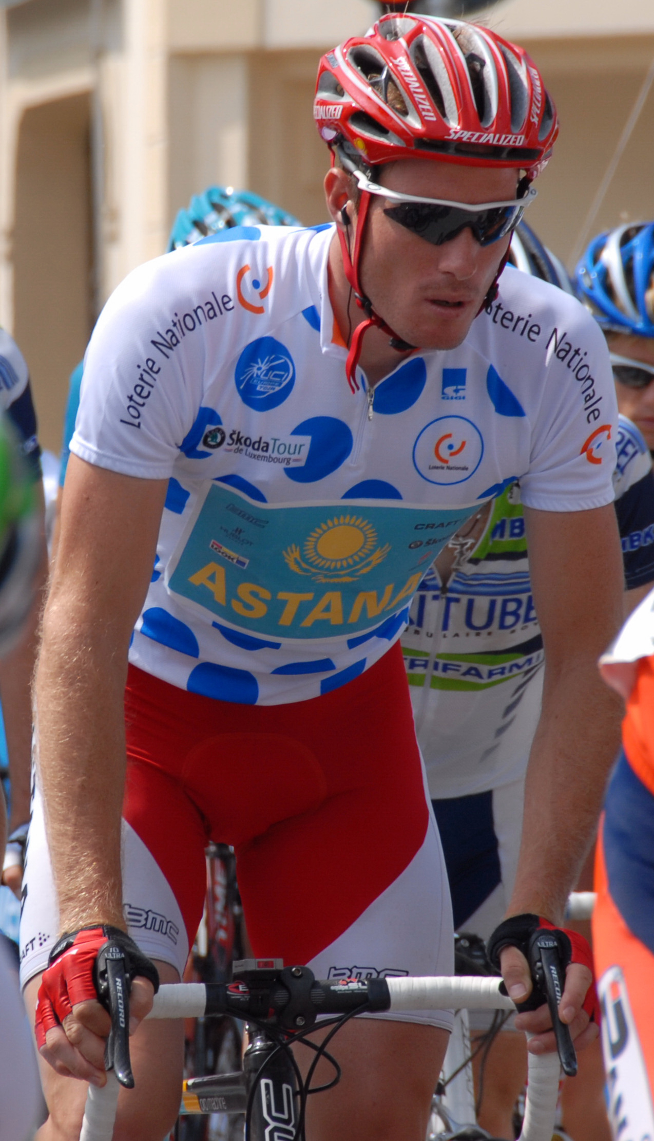 De Grégory Rast beim Départ zu Miersch vun der 4. Etapp vum Skoda Tour de Luxembourg 2007